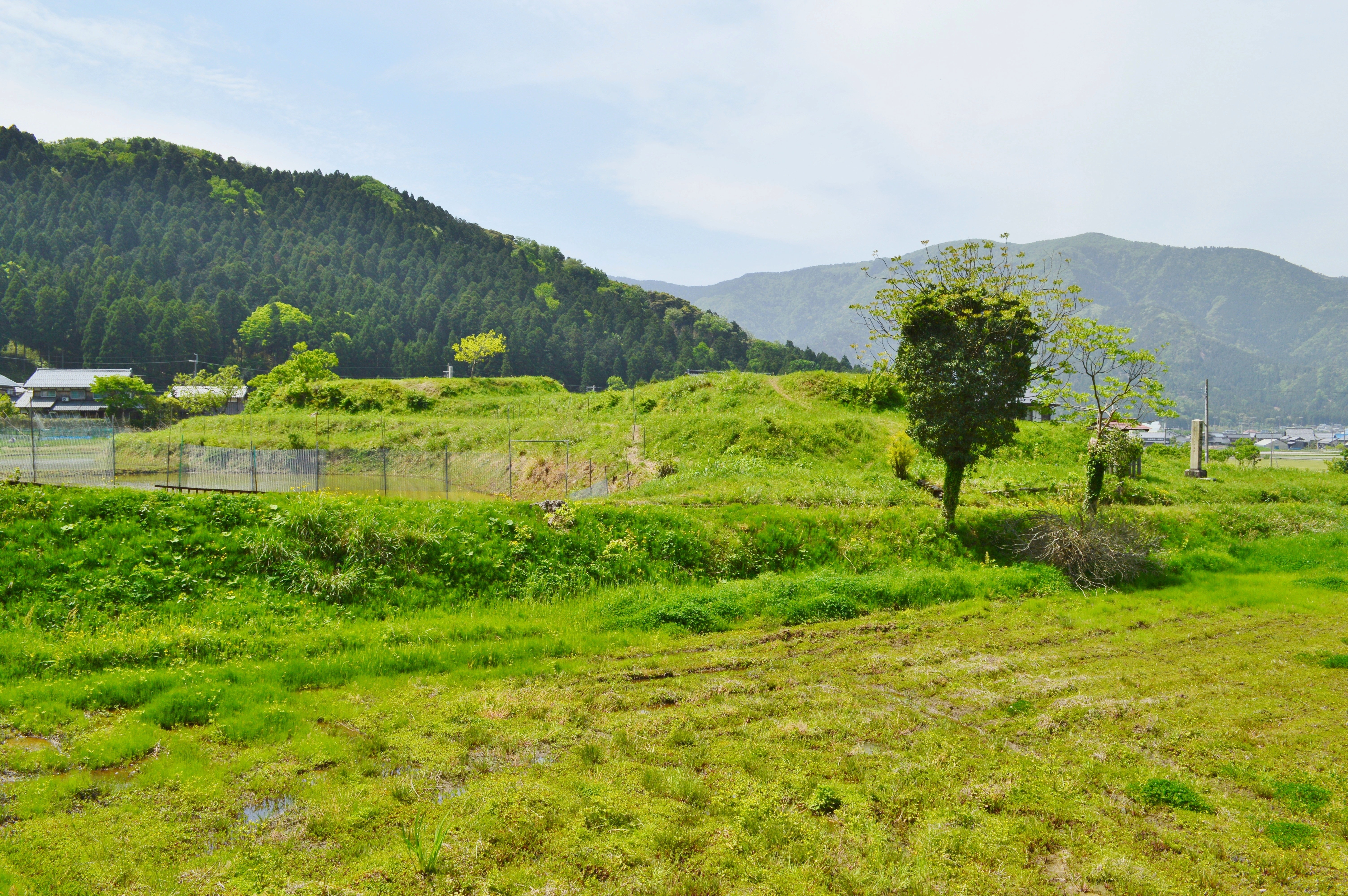 上ノ塚古墳 墳丘全景